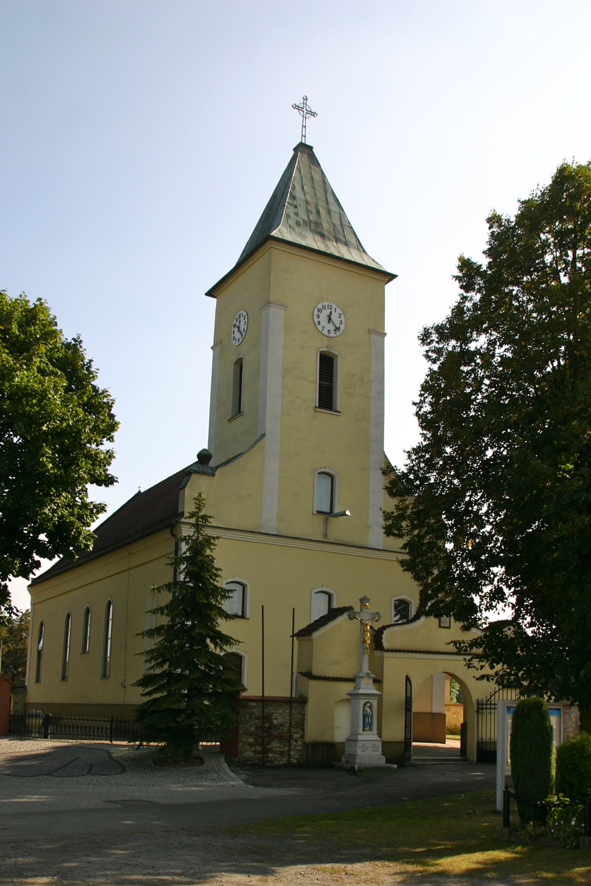 Mechnica - kościół parafialny p.w. św. Jakuba, 1794.